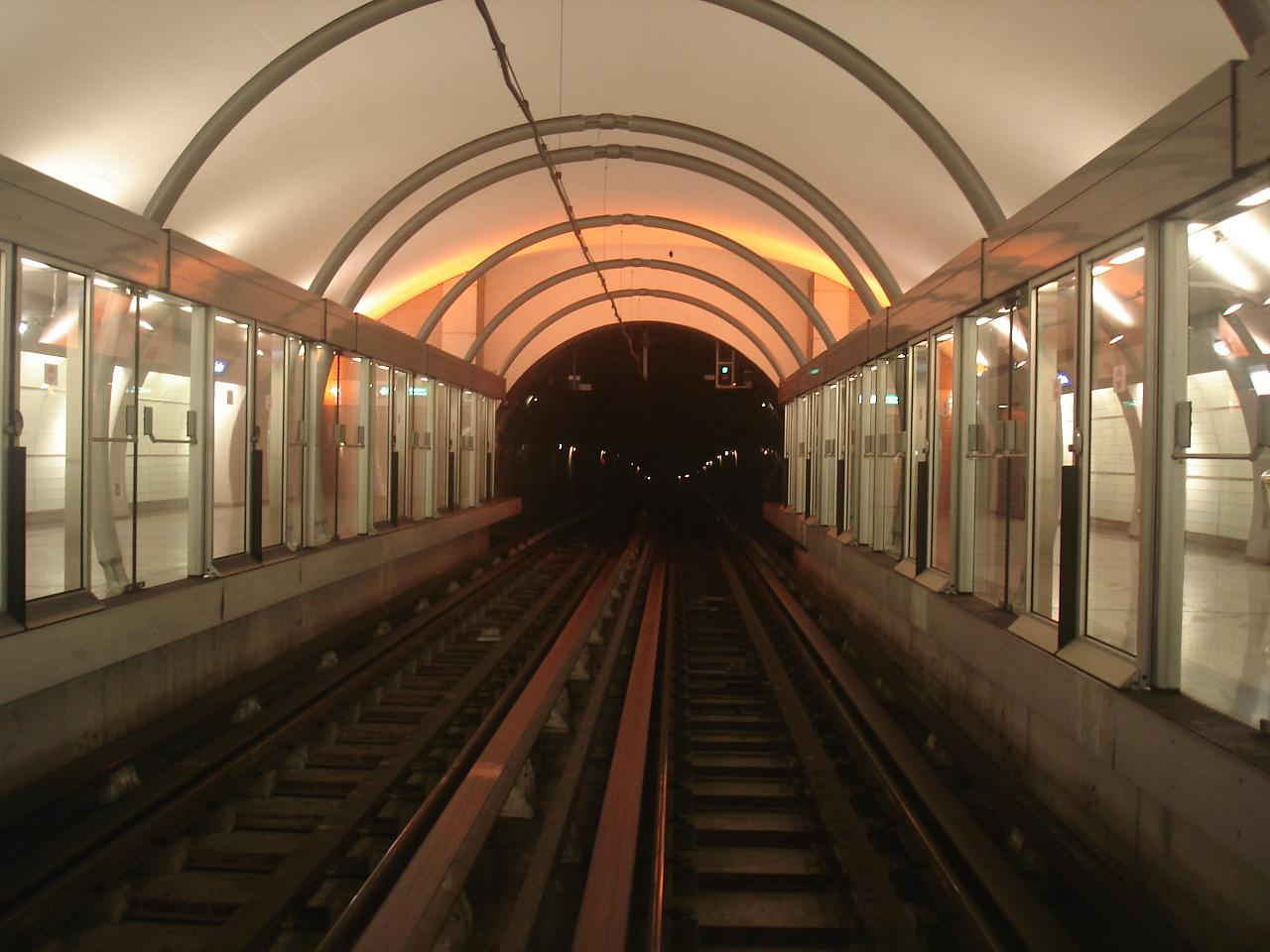 automatische Métrolinie 14, Wagen vorn, Foto in Fahrtrichtung, Station Olympiades